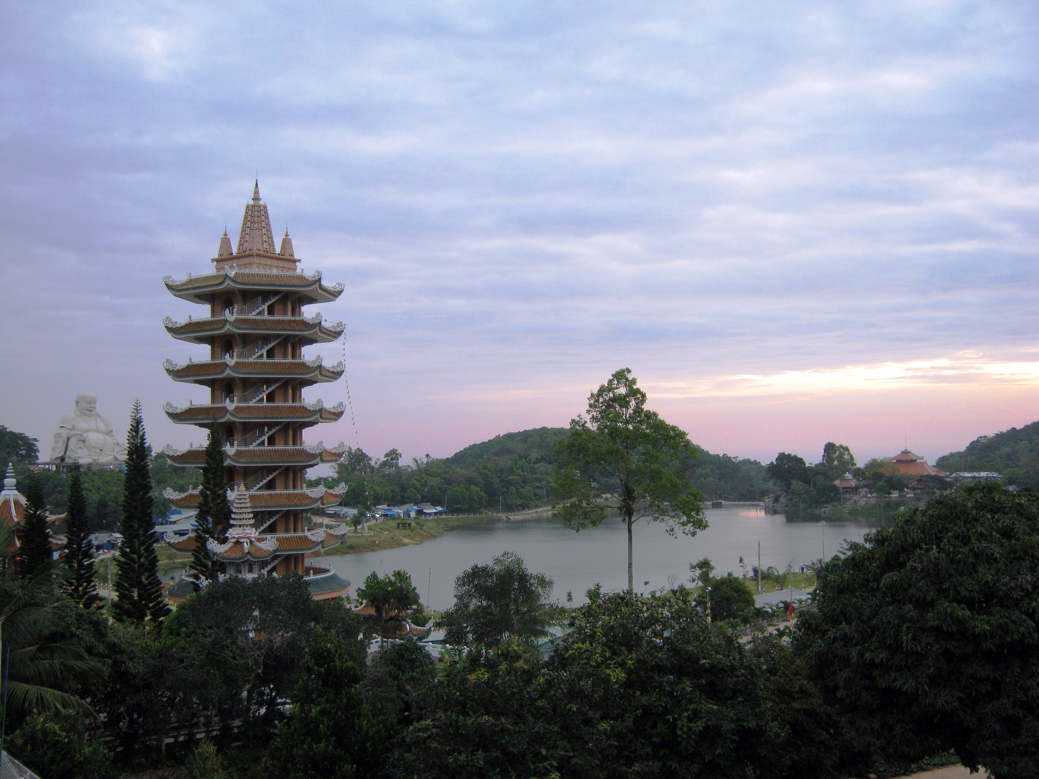 Từ trên đỉnh núi Cấm (An Giang, Việt Nam) nhìn xuống khu vực hồ Thủy Liêm.